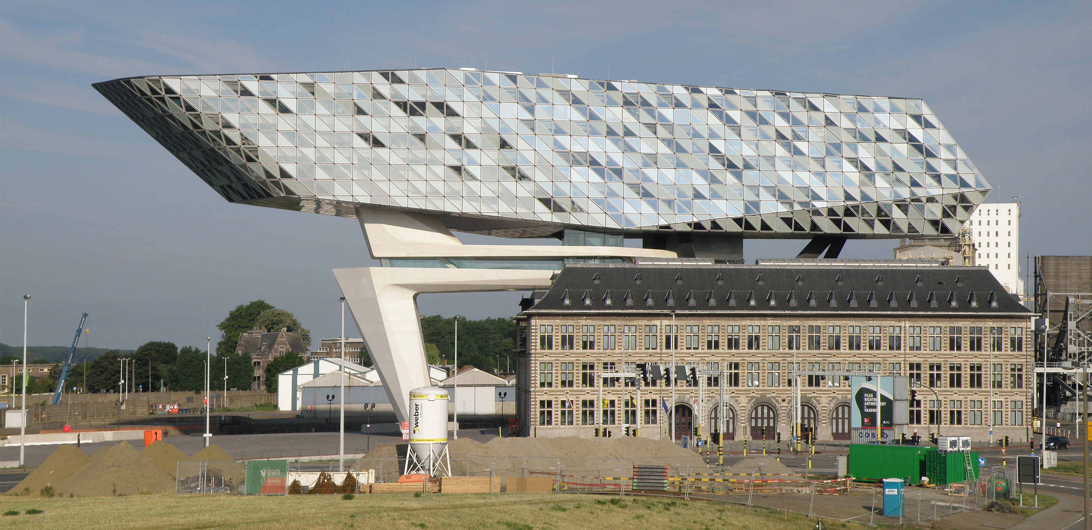 Antwerpen (België). Havenhuis, aan het Kattendijkdok.